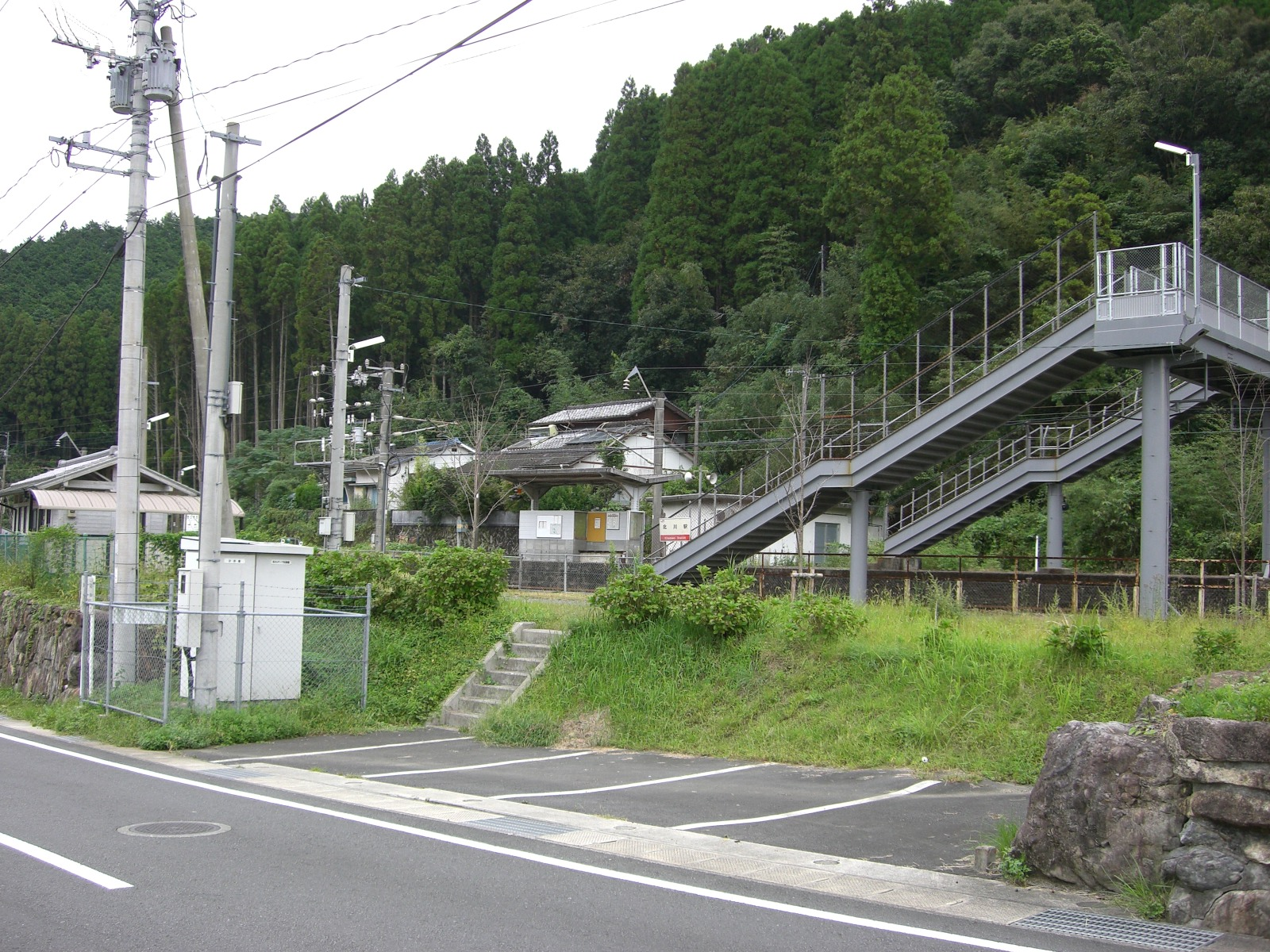 北川駅駅舎